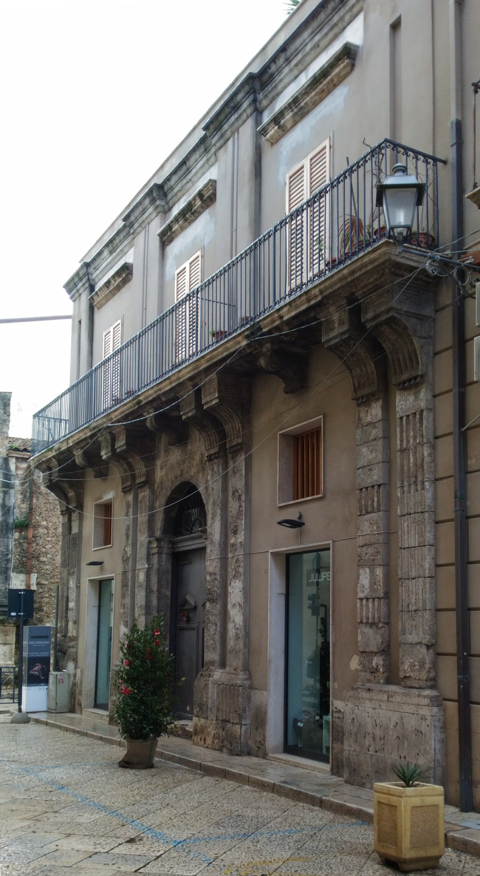 Ex Loggia Comunale, Alcamo